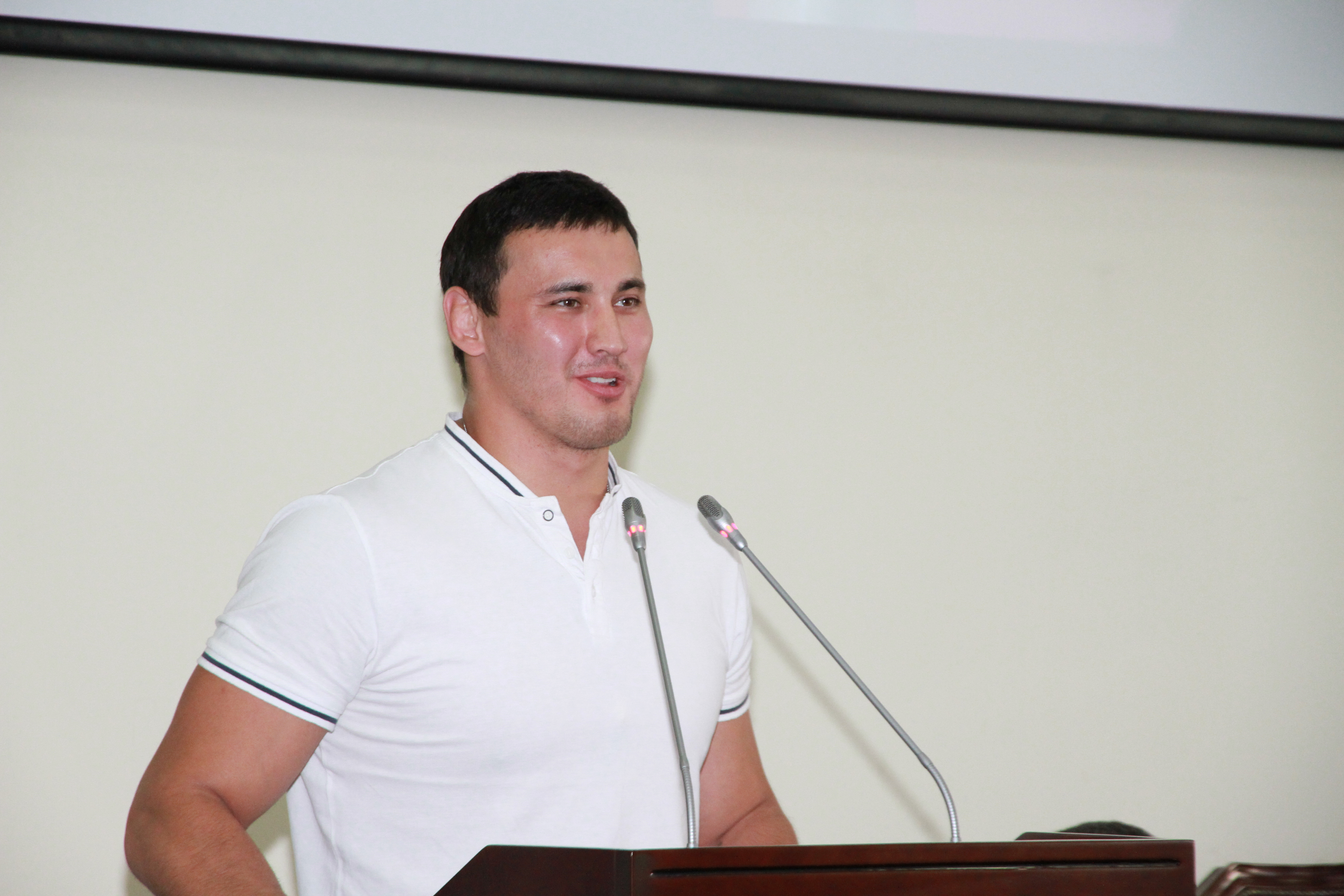 Саха тыла: Азия Чемпиона Лазарев Айаал Петрович 2018 с. хаартыската